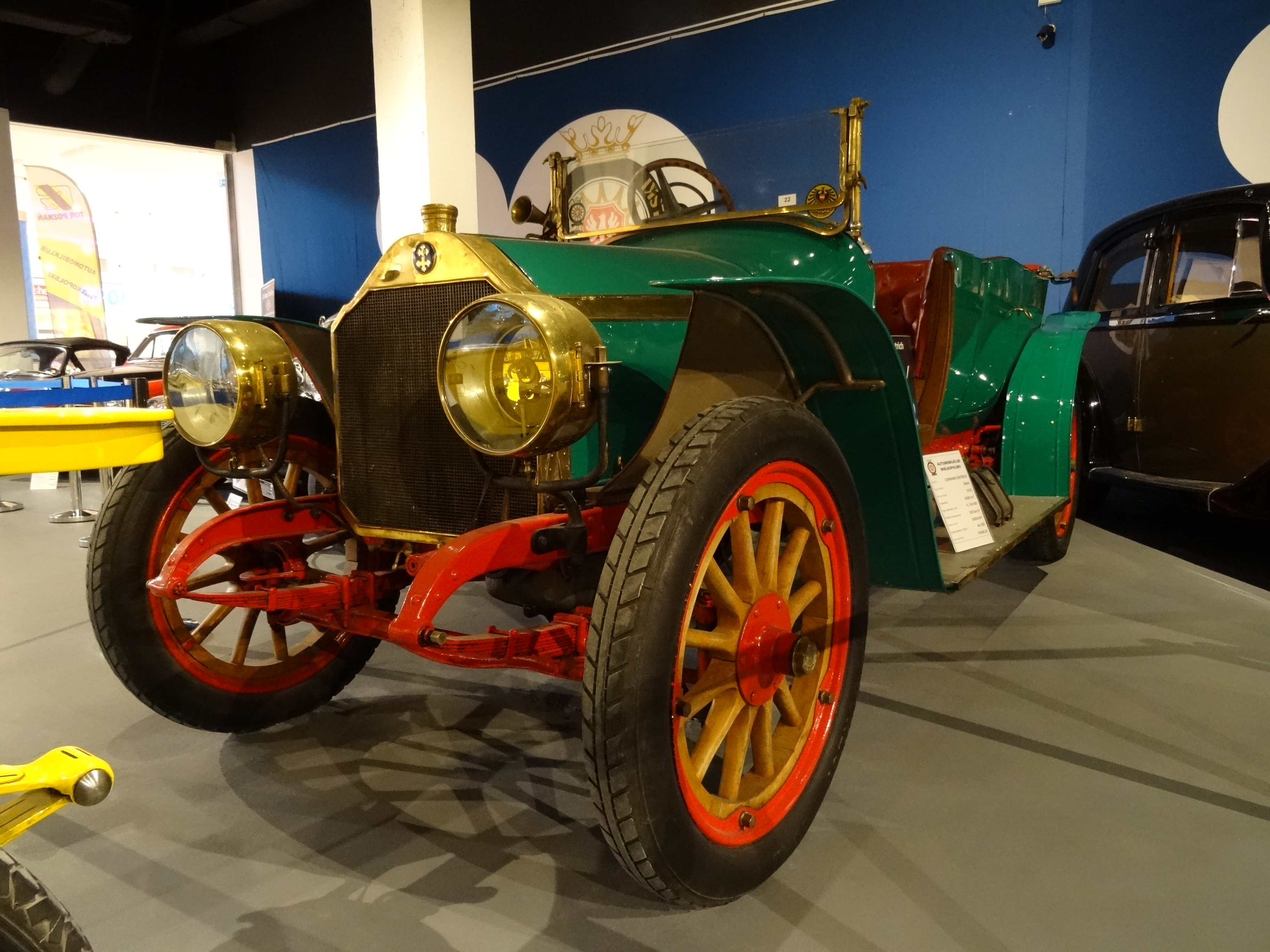 Lorraine-Dietrich SMHI, Francja, 1913 r.